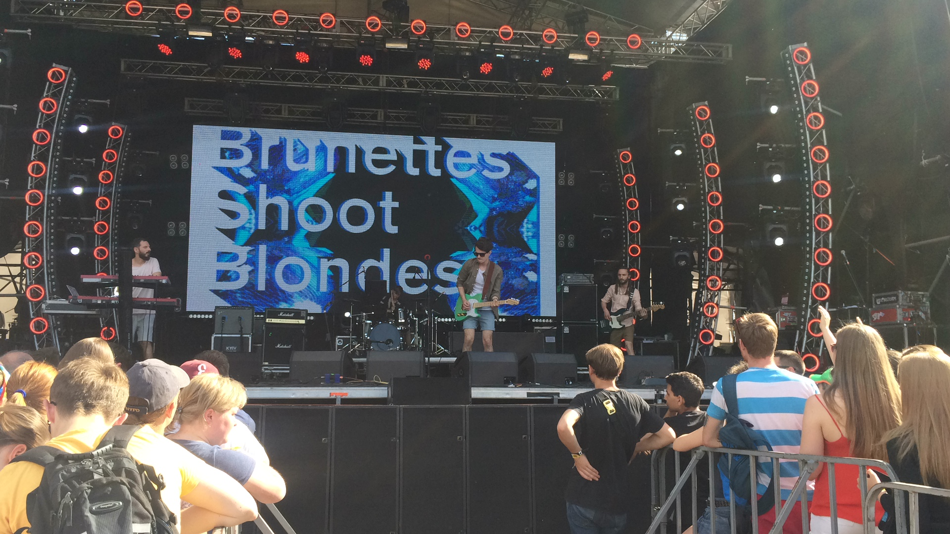 Фестиваль Atlas Weekend 2017.West stage - гурт Brunettes Shoot Blondes